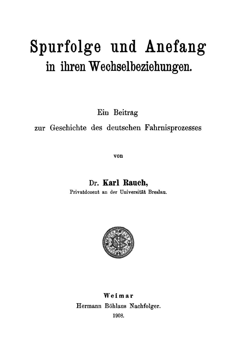 Spurfolge und Anefang in ihren Wechselbiziehungen